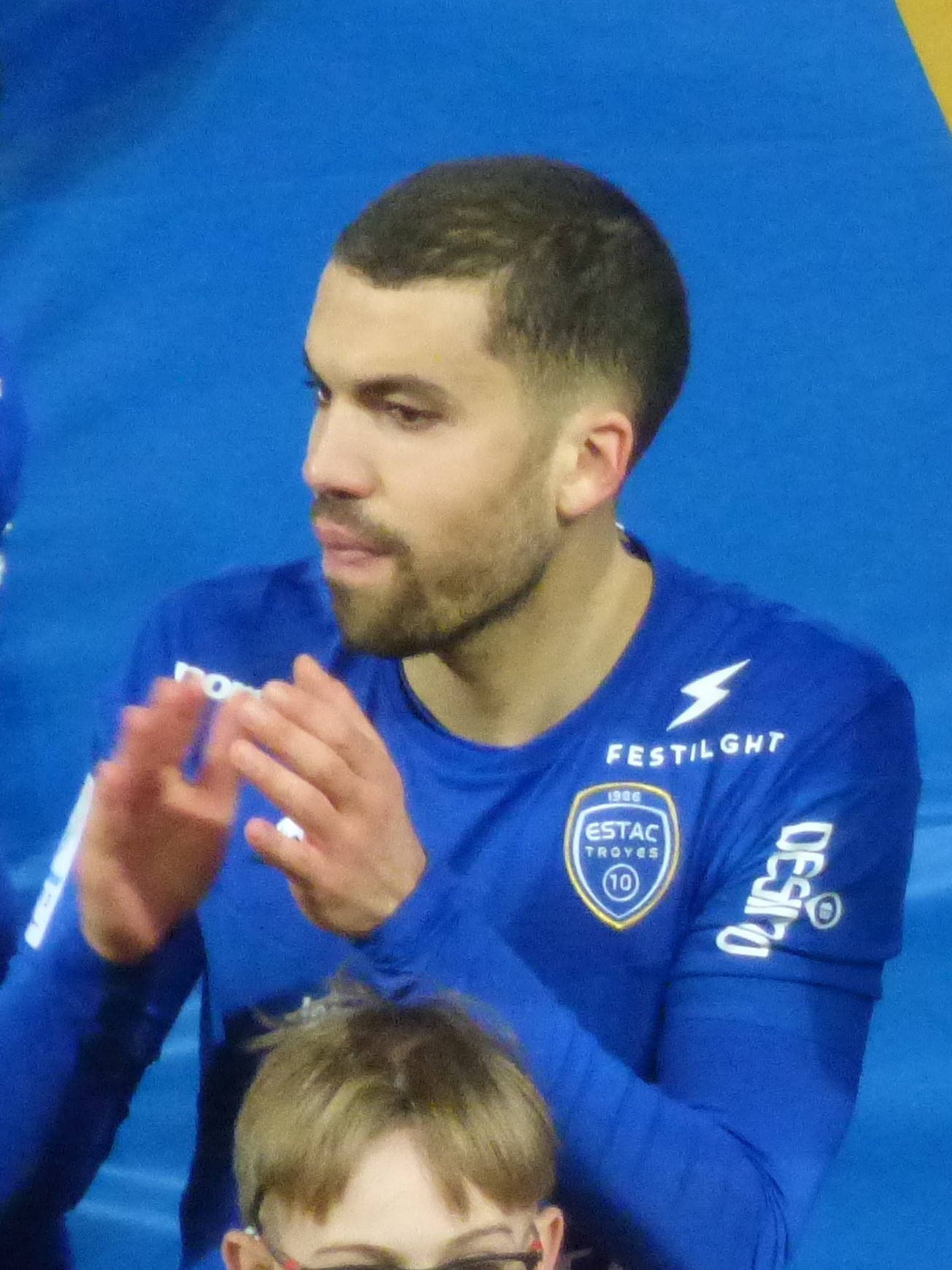 Oualid El Hajjam lors du match RC Lens / ES Troyes AC, comptant pour la vingt-troisième journée du championnat de France de football de Ligue 2 2019-2020, le 4 février 2020, au Stade Bollaert-Delelis de Lens